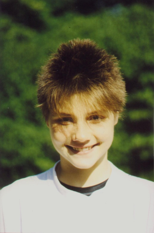 Portrait von Julia Jung